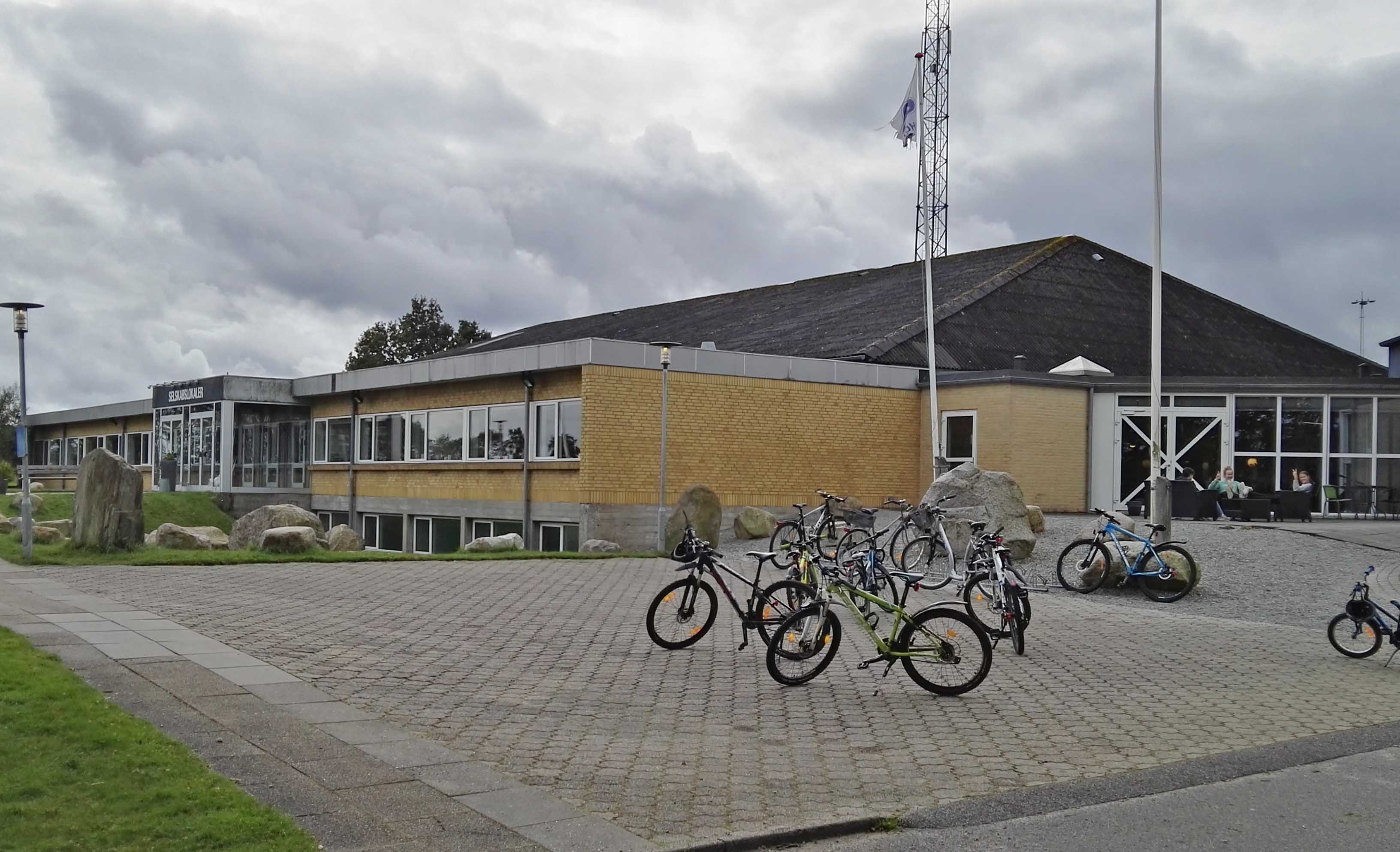 Stoholm Fritids- og Kulturcenters selskabslokaler